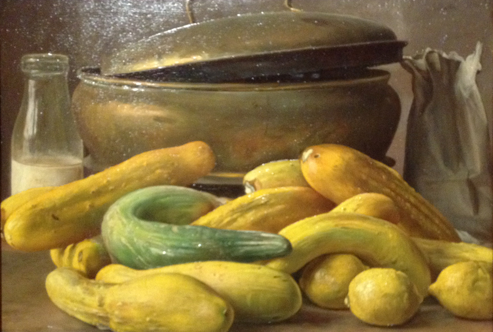 Ernst te Peerdt, Gurkenstillleben, Öl auf Leinwand, 1917 erworben auf der Großen Berliner Kunstausstellung in Düsseldorf durch Museum Kunstpalast, Inv.-Nr. M 4202